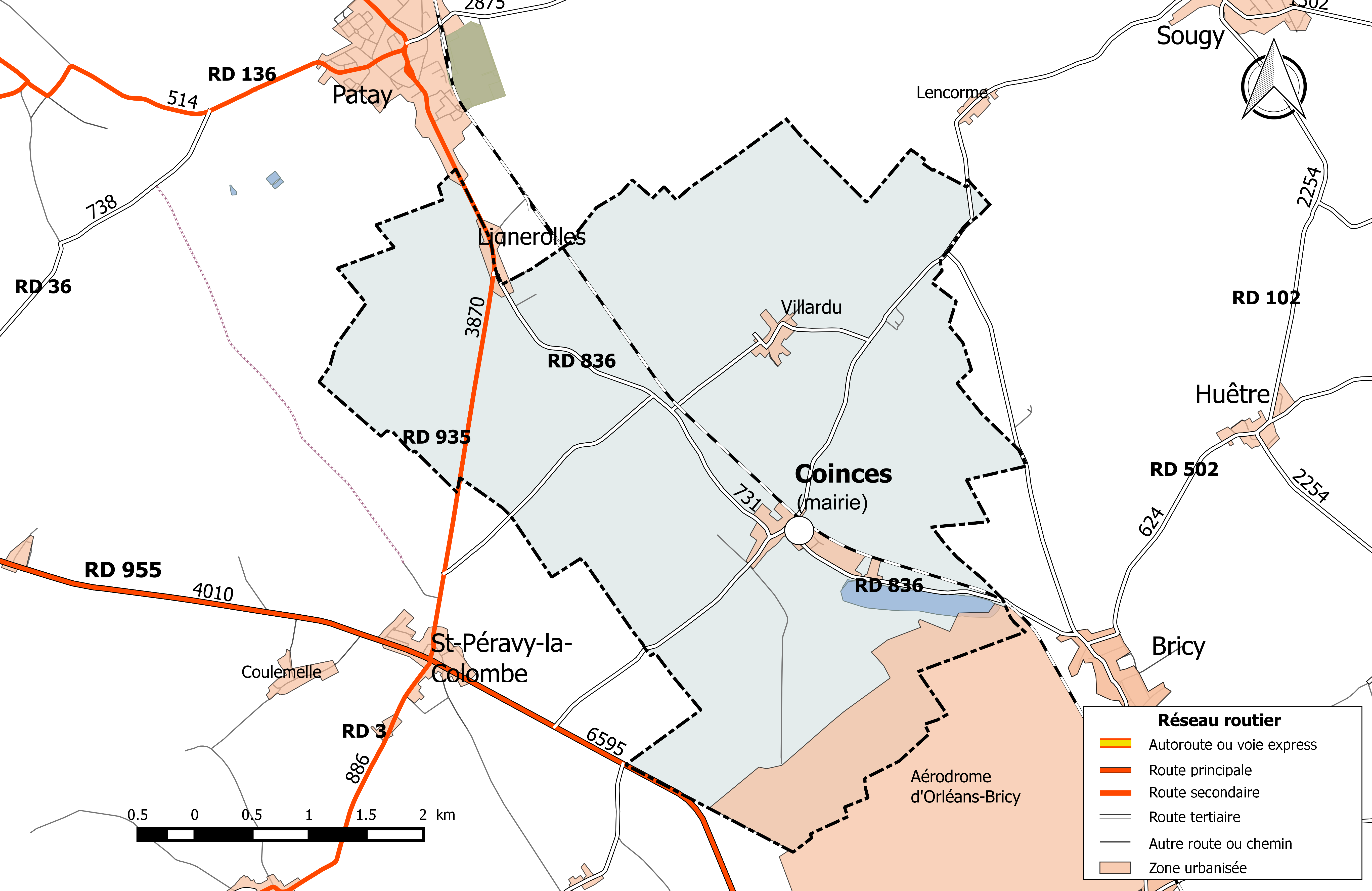 Carte du réseau routier de la commune de Coinces.